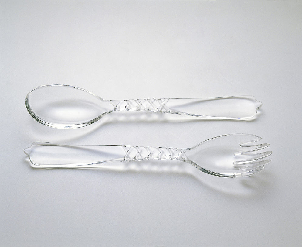 Posate a Tortiglione prodotte nel 1938 dalla Fratelli Guzzini